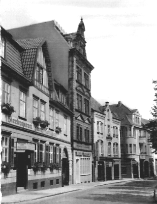 Nordseite des Neustadtmarktes in Warburg ca 1920